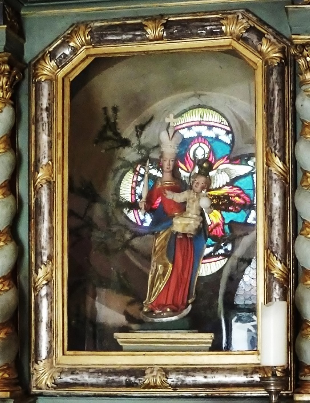 Wallfahrtskirche Unsere Liebe Frau Hochfeistritz, Gnadenstatue "Maria in der Fichte"